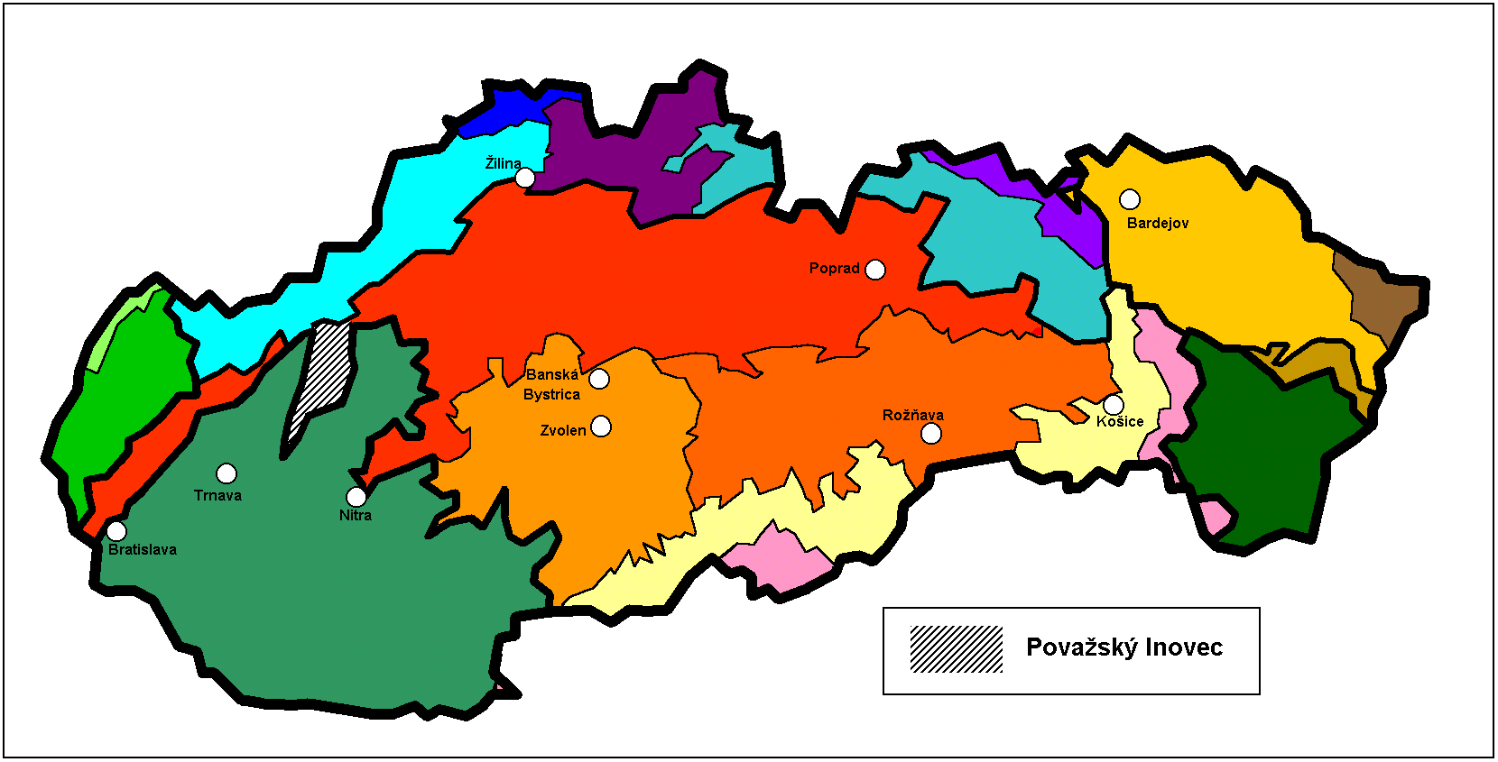 Povazský_Inovec